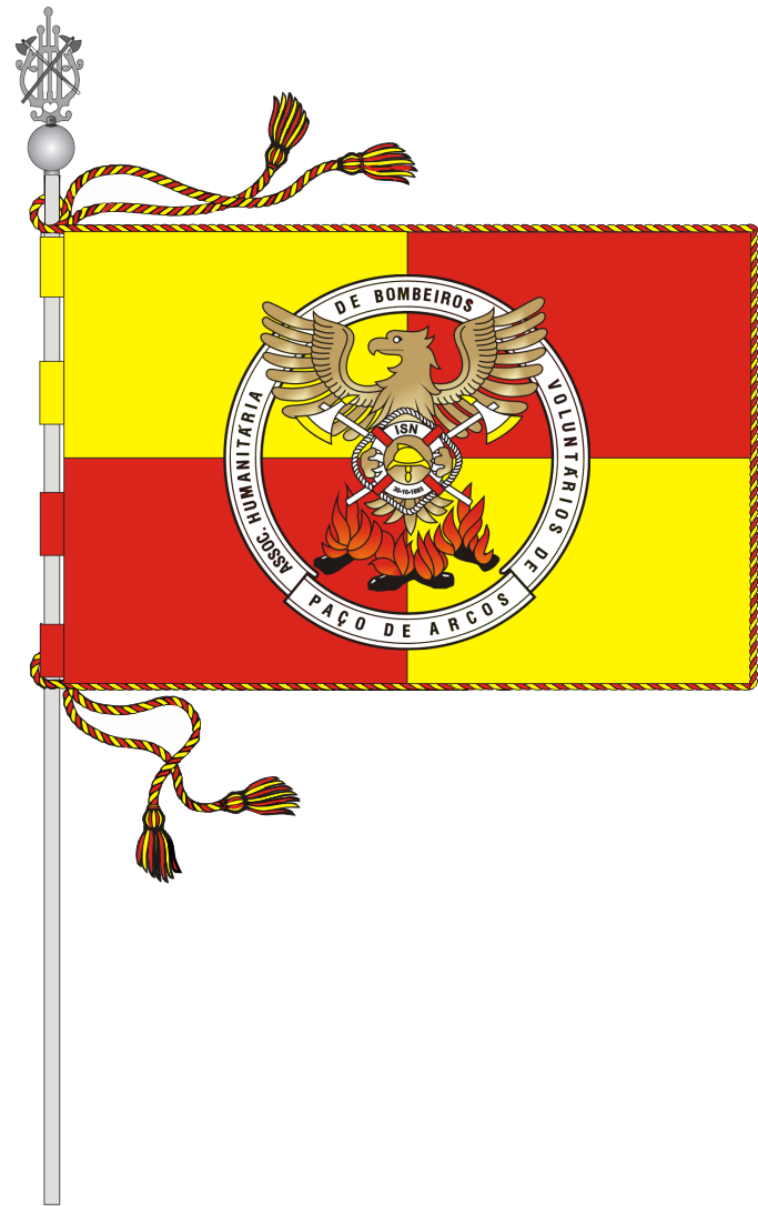 Estandarte da Associação Humanitária de Bombeiros Voluntários de Paço de Arcos